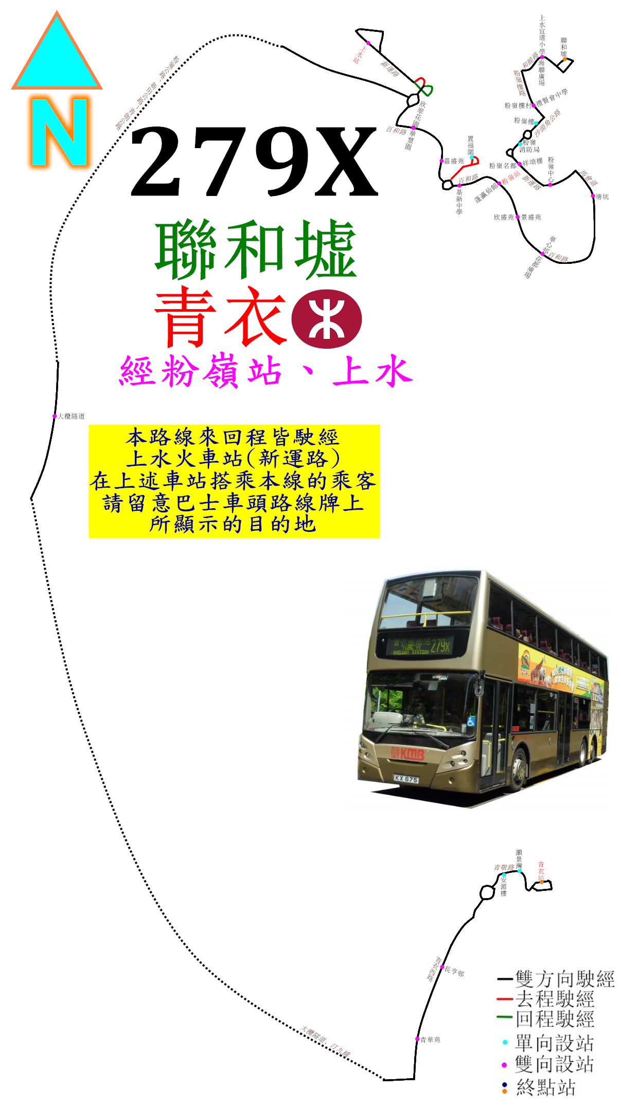 中文（香港）: 九巴279X線的走線圖